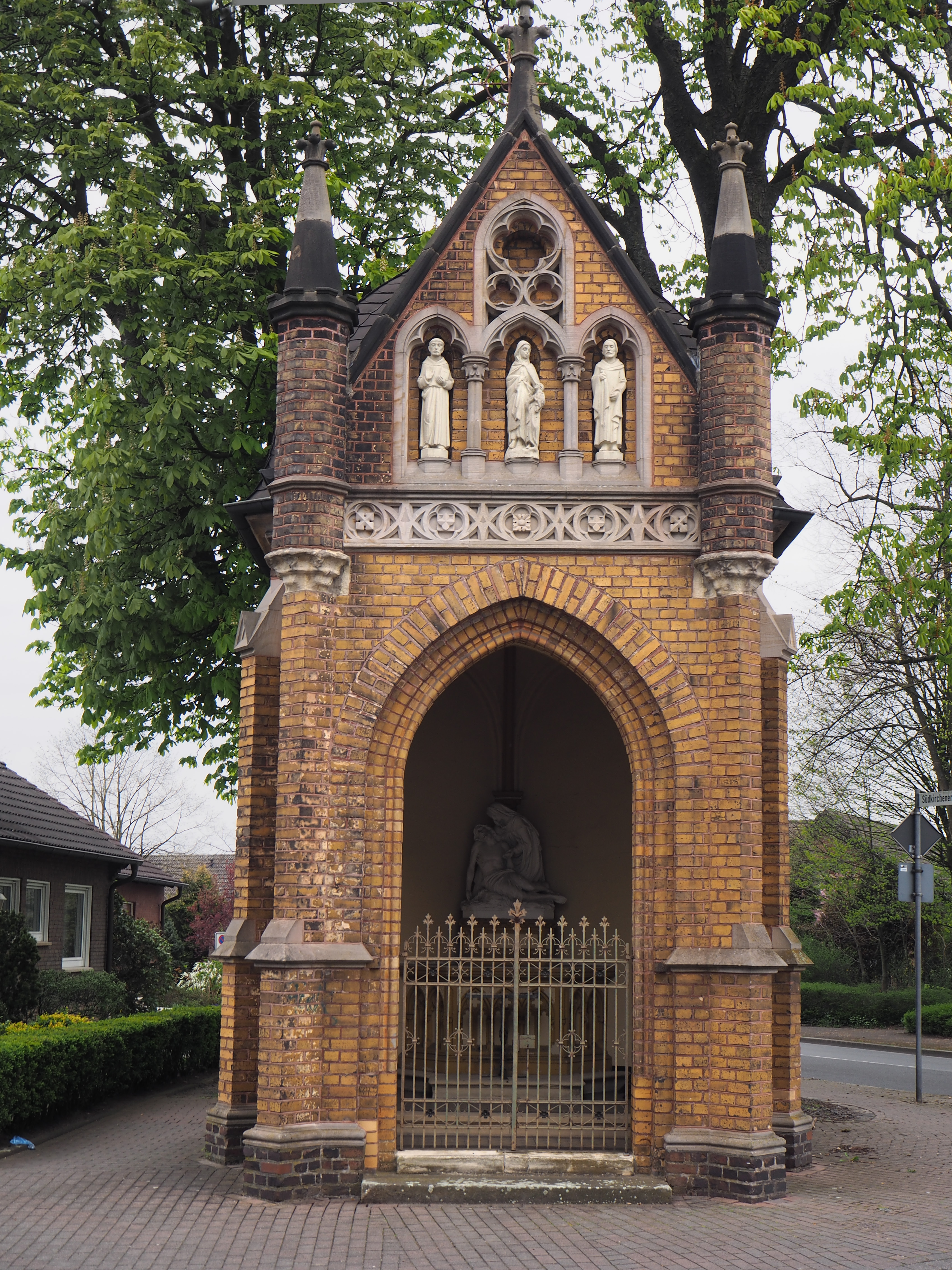 Selm (NRW), Wegekapelle (Kaldeweykapelle), Foto: April 2017